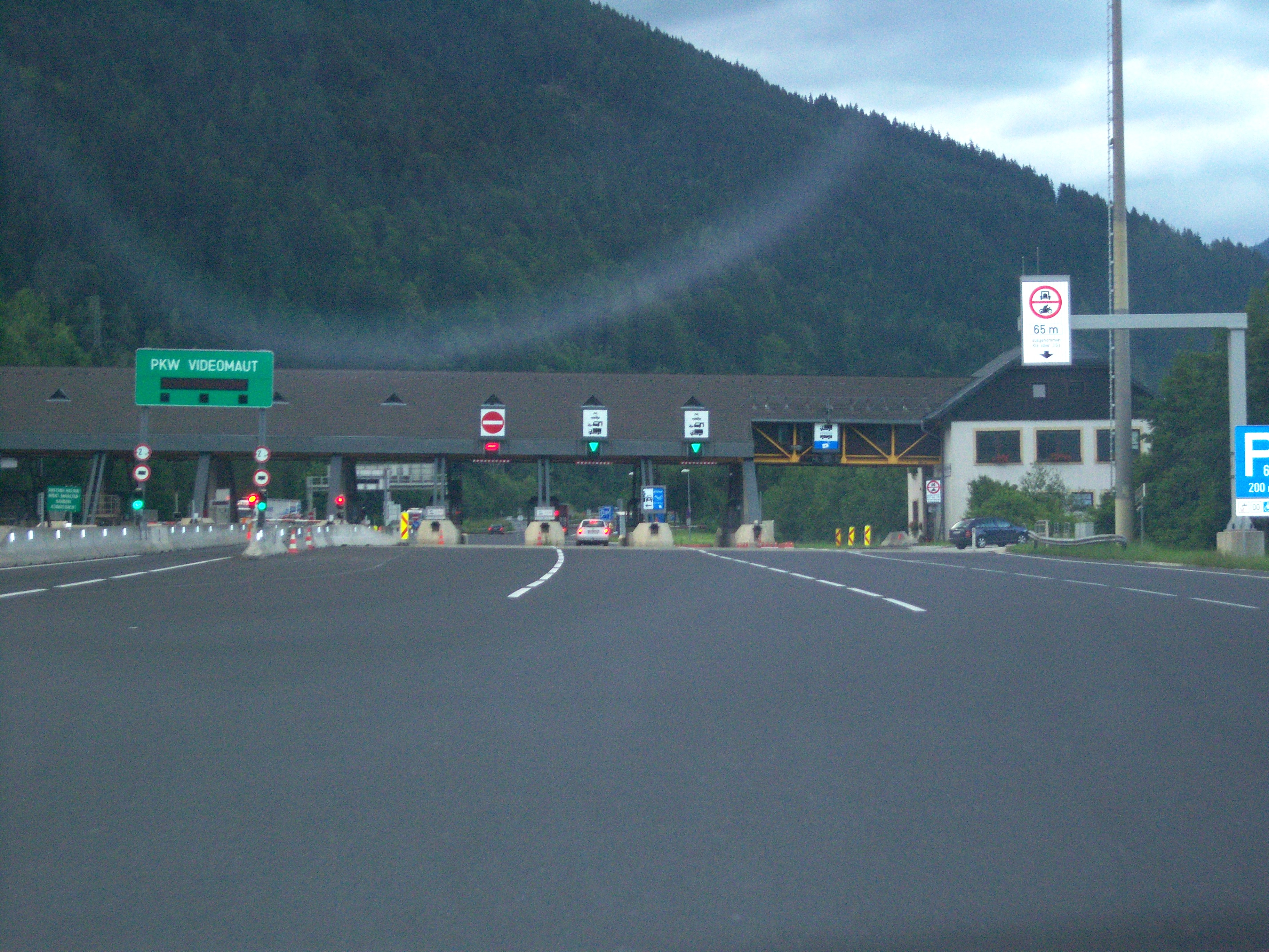 Pyhrn Autobahn A9 Richtung Voralpenkreuz vor der Mautstelle Bosruck